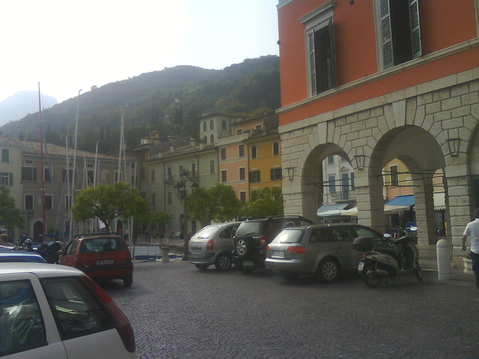 Gargnano, il porto. A destra l'ex Municipio e sullo sfondo nel muro le palle di cannone del bombardamento navale austriaco del 1866.